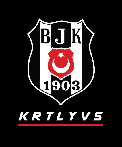 Amblem